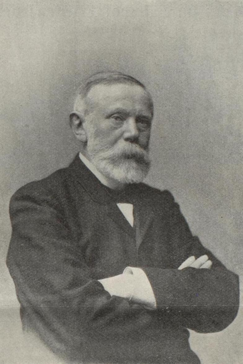 Porträtfoto von Johann Fülscher, um 1895